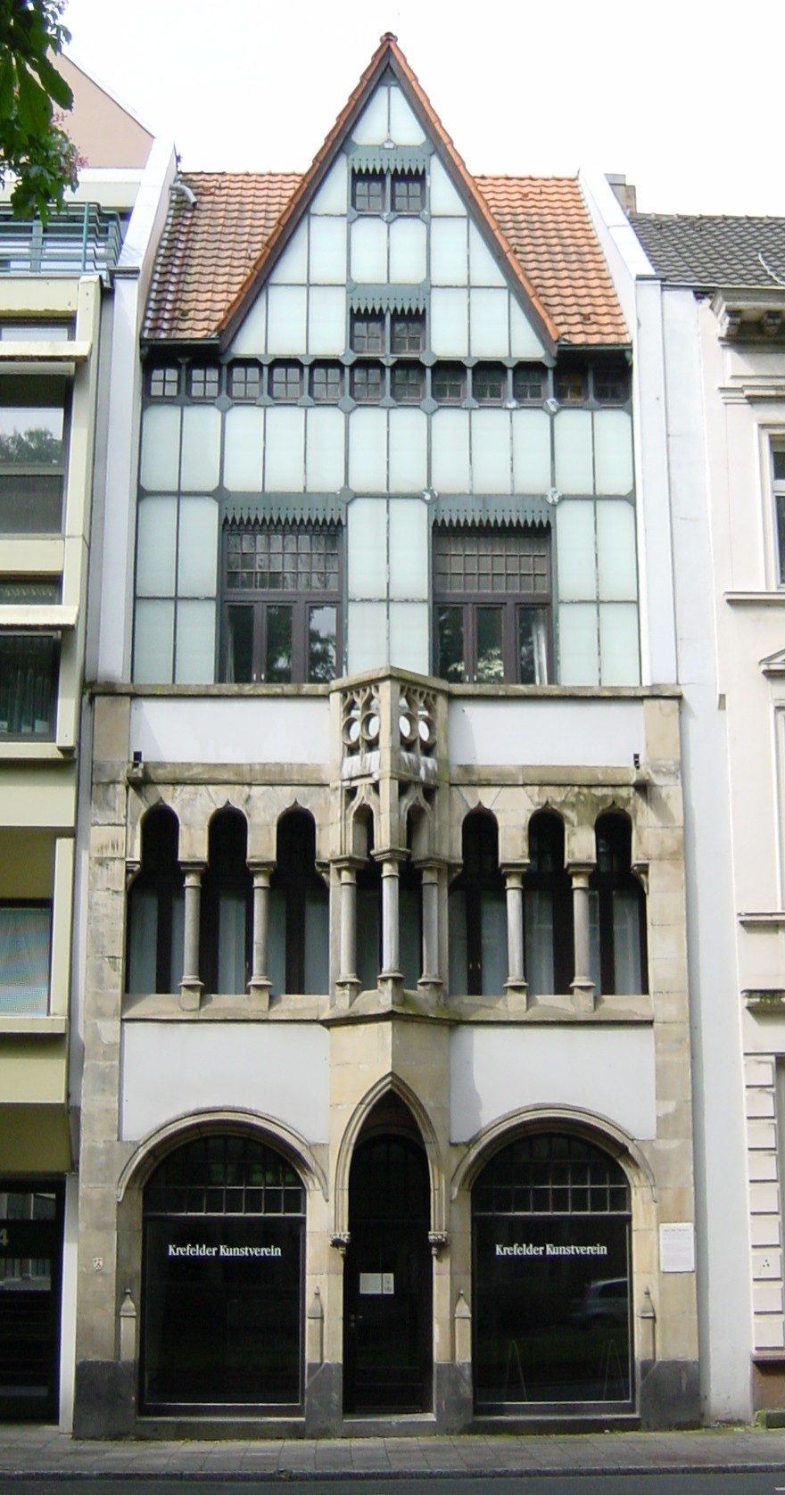 Buschhüterhaus, Westwall, Krefeld Karl Buschhüter (1872–1956) DescriptionGerman architectDate of birth/death 3 September 1872 21 August 1956 Location of birth/death – KrefeldWork location Krefeld Authority control : Q1730603 VIAF: 69728058 ISNI: 0000 0000 6678 5868 ULAN: 500077704 GND: 118914782 RKD: 247628 creator QS:P170,Q1730603